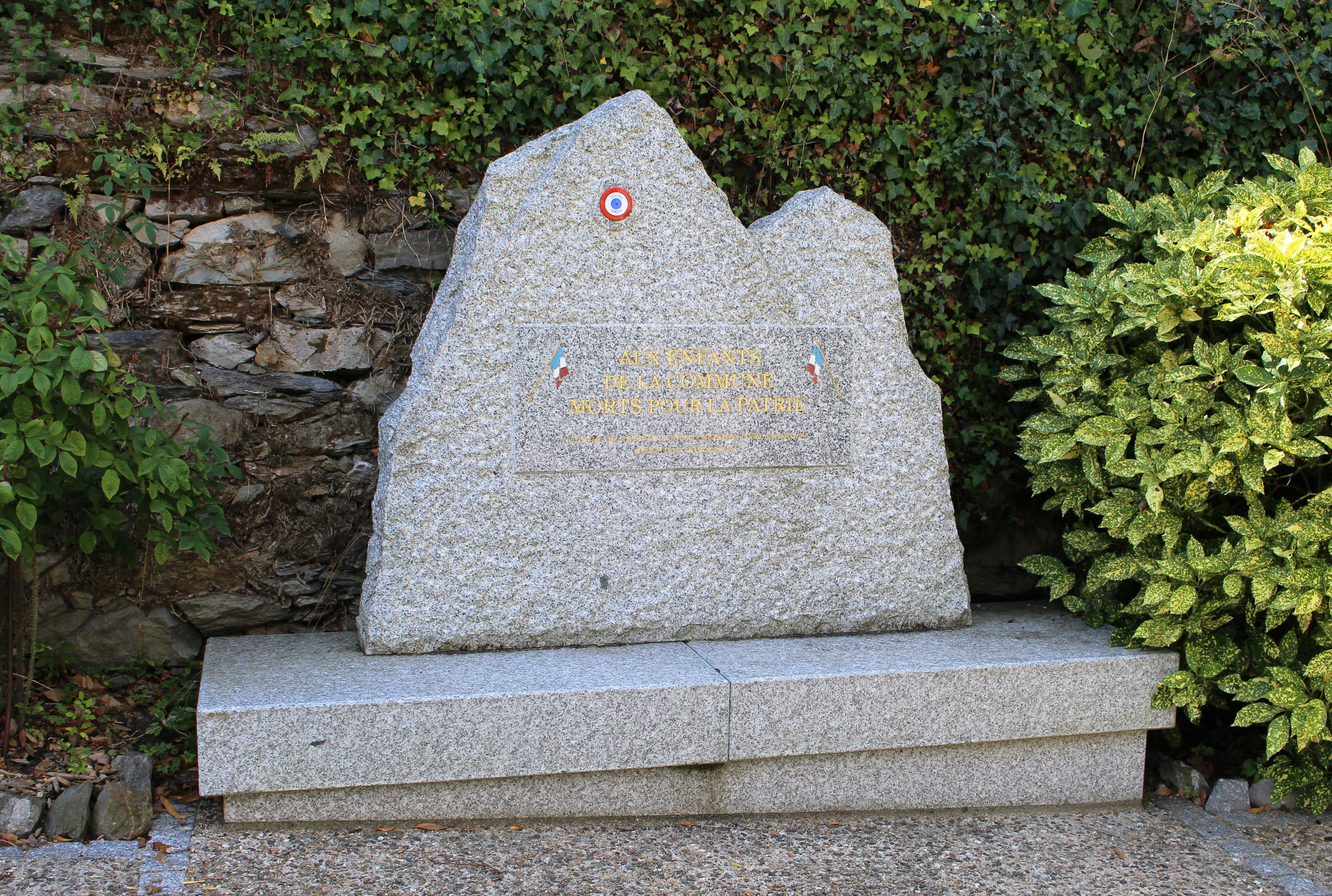 Monument aux morts de Jarret (Hautes-Pyrénées)